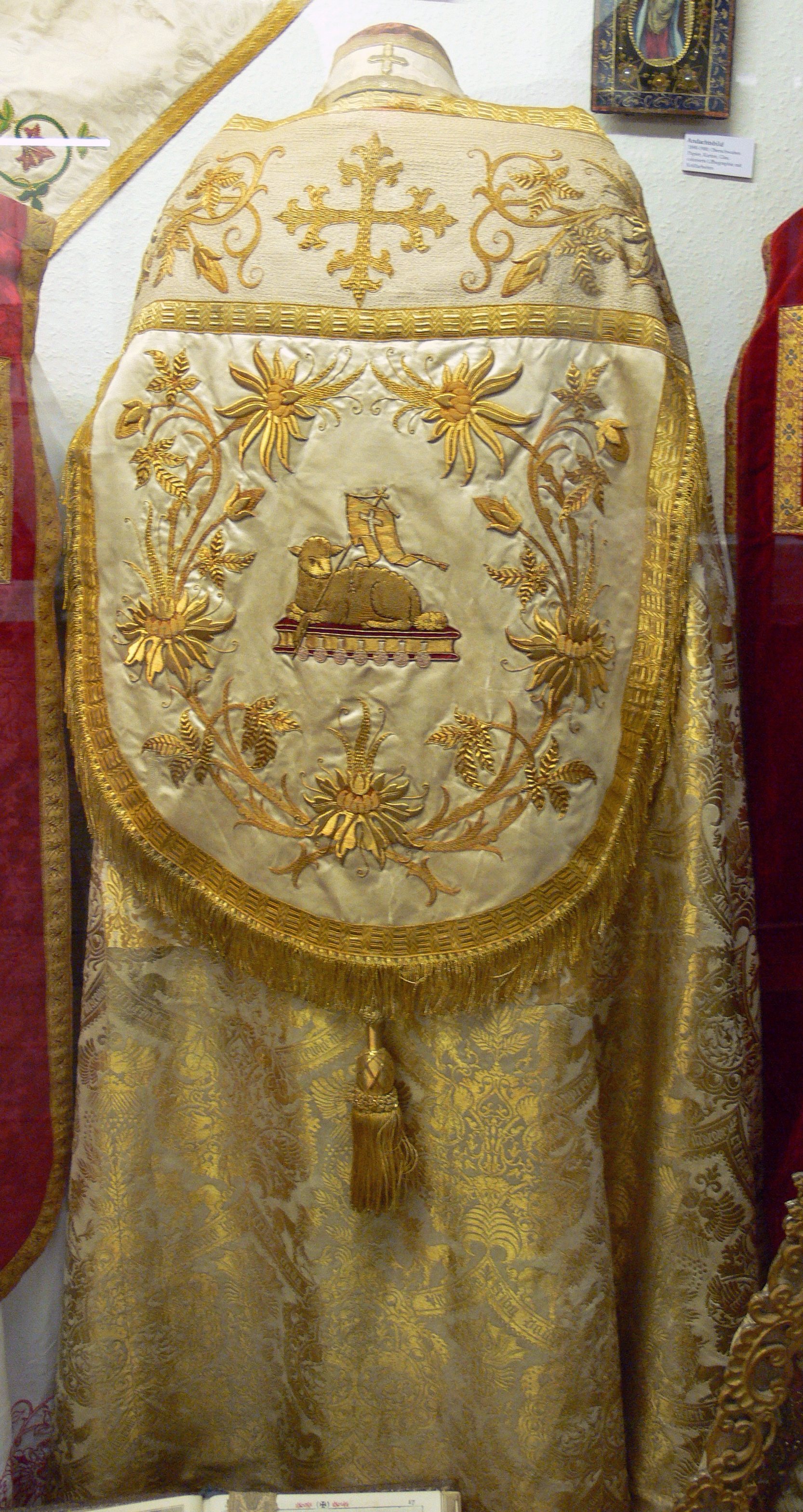 Weingarten, Museum für Klosterkultur Pluviale mit Stola, Oberschwaben (Fa. Neff, Biberach), um 1910, Gros de Tours lamée, florale Reliefstickerei (Lamm und Buch mit sieben Siegeln)